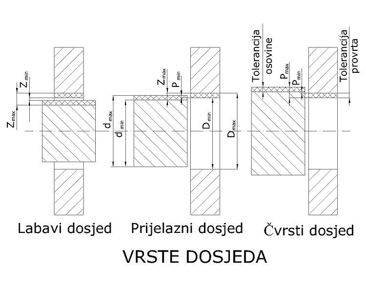 Vrste dosjeda